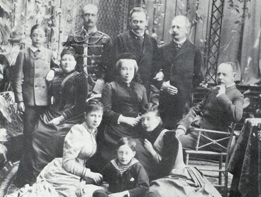 Portret van de koninklijke familie van Saksen-Weimar-Eisenach omstreeks 1886. Afbeelding komt in meerdere publicaties voor.